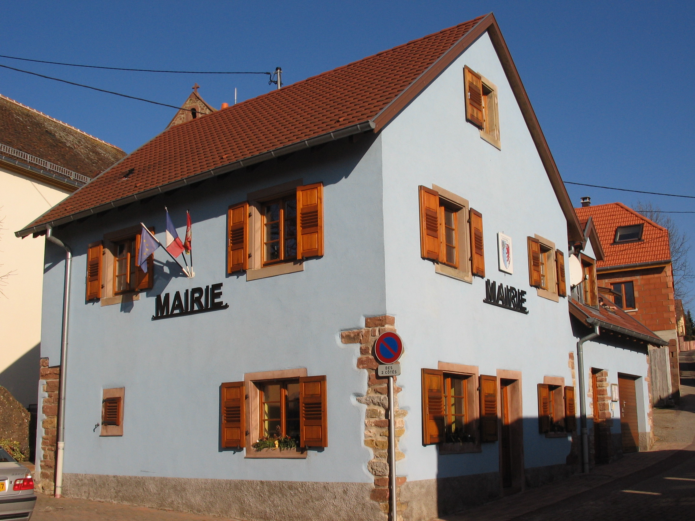 mairie de Salenthal (Bas-Rhin - Alsace)